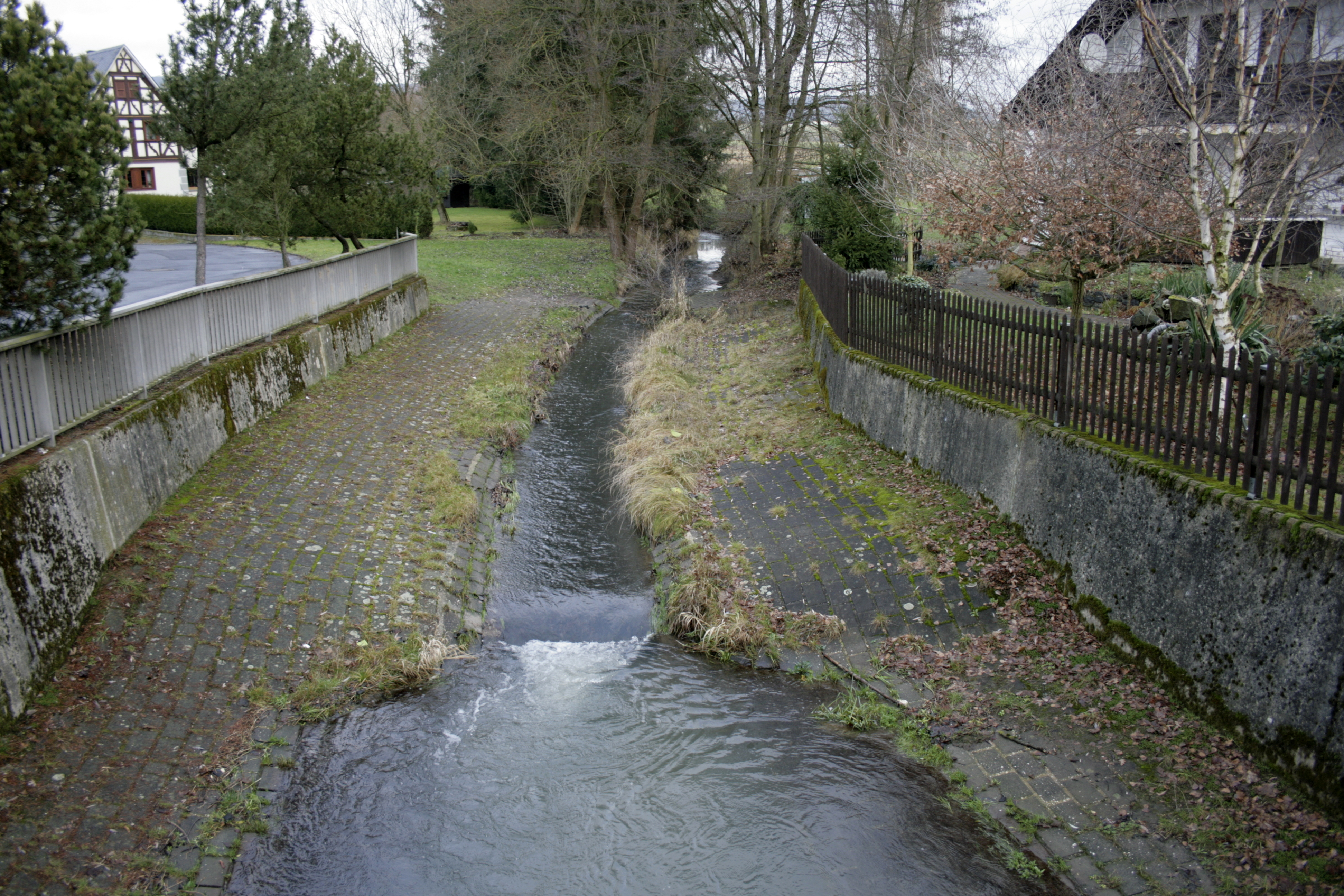 Salzbach in Dornburg-Thalheim, Deutschland